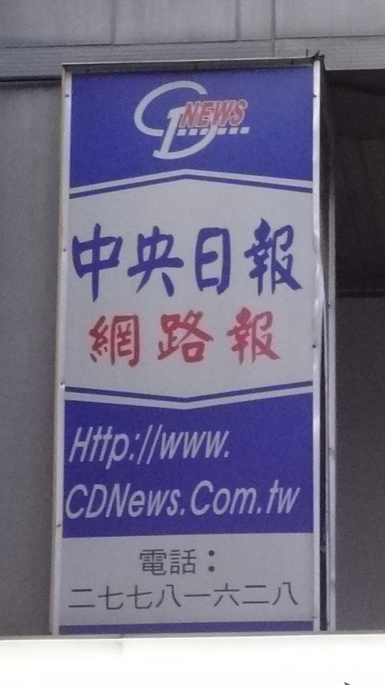 中央日報網路報總部，位於臺北市中山區龍江路23號2樓。此為外牆招牌。